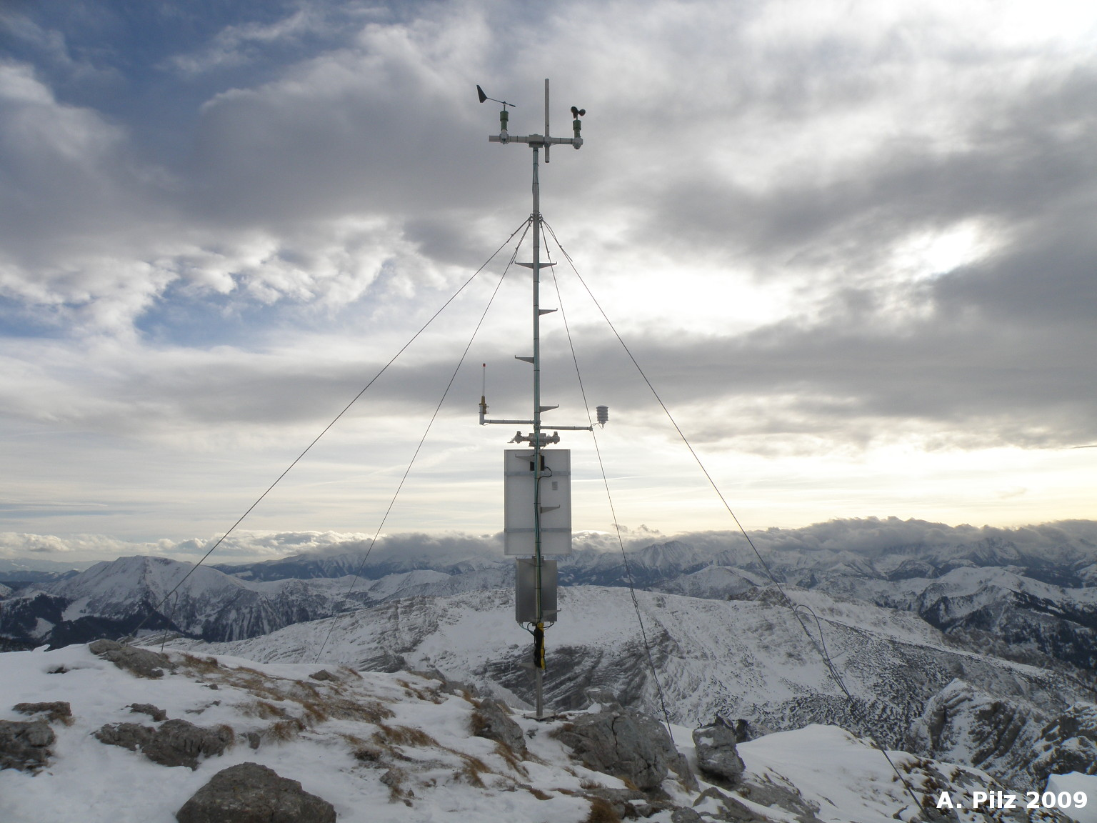 Messstation Zinödl 2009